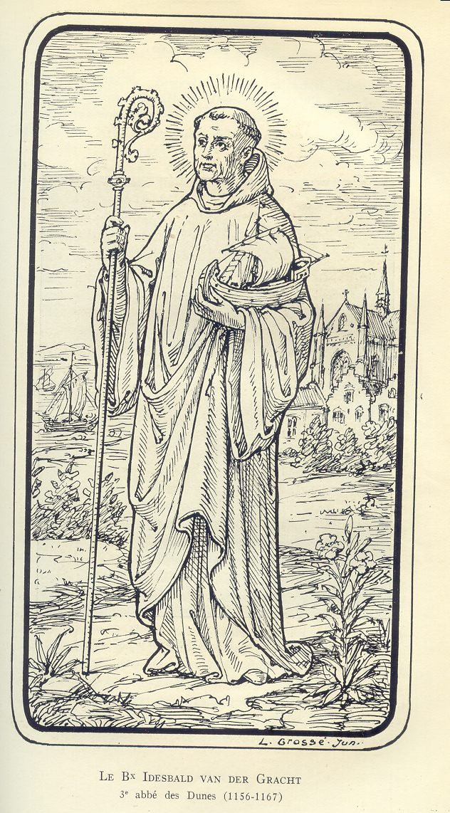 Gravure de Saint Idesbald, 3e abbé de l'abbaye des Dunes, Belgique